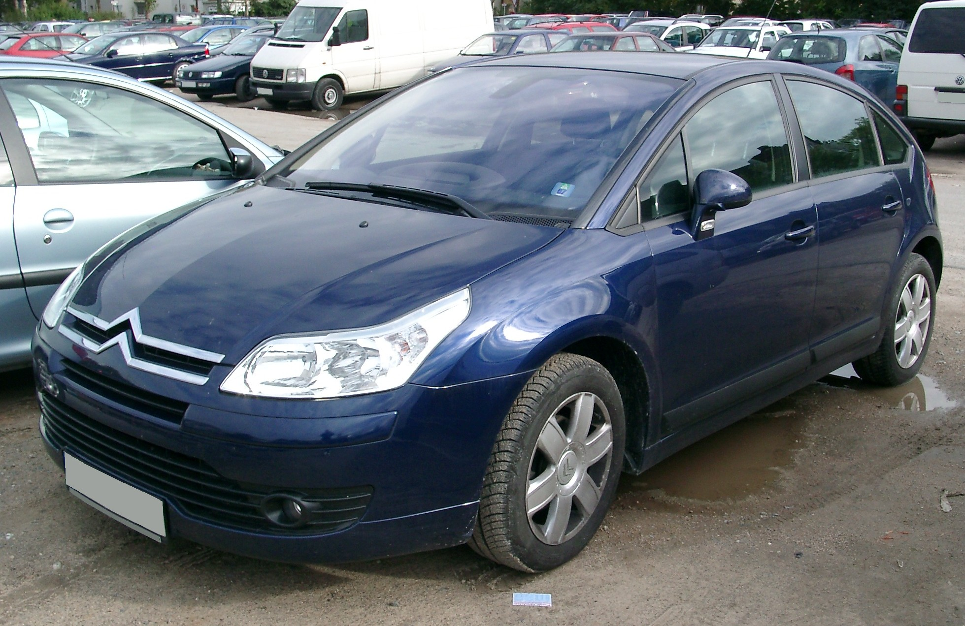 Citroen C4